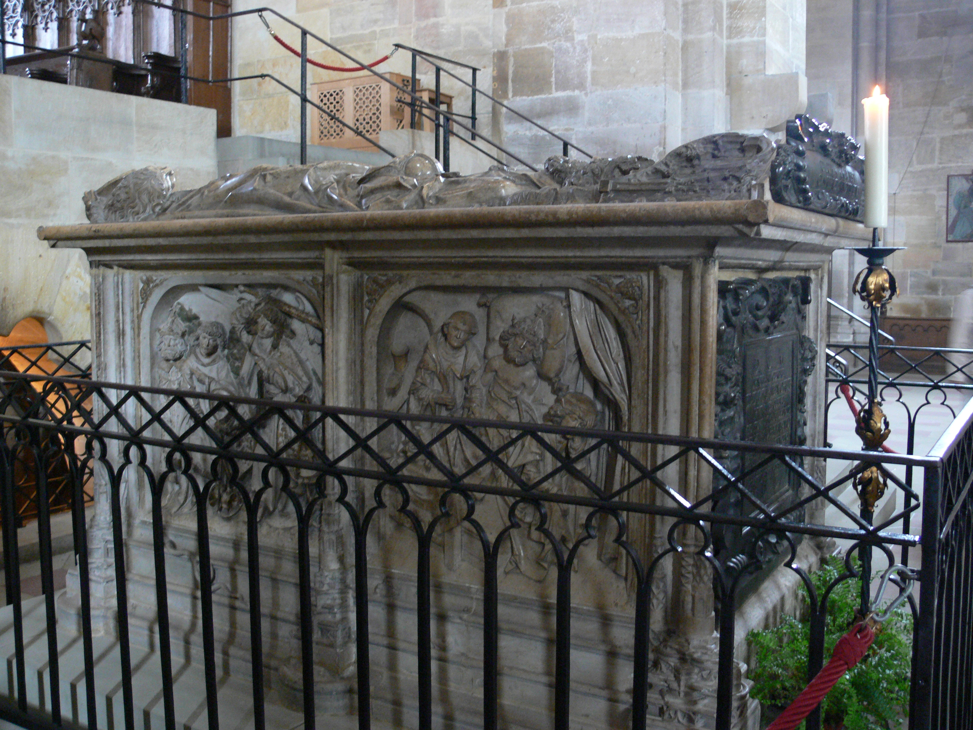 Bamberg, Dom Kaisergrab